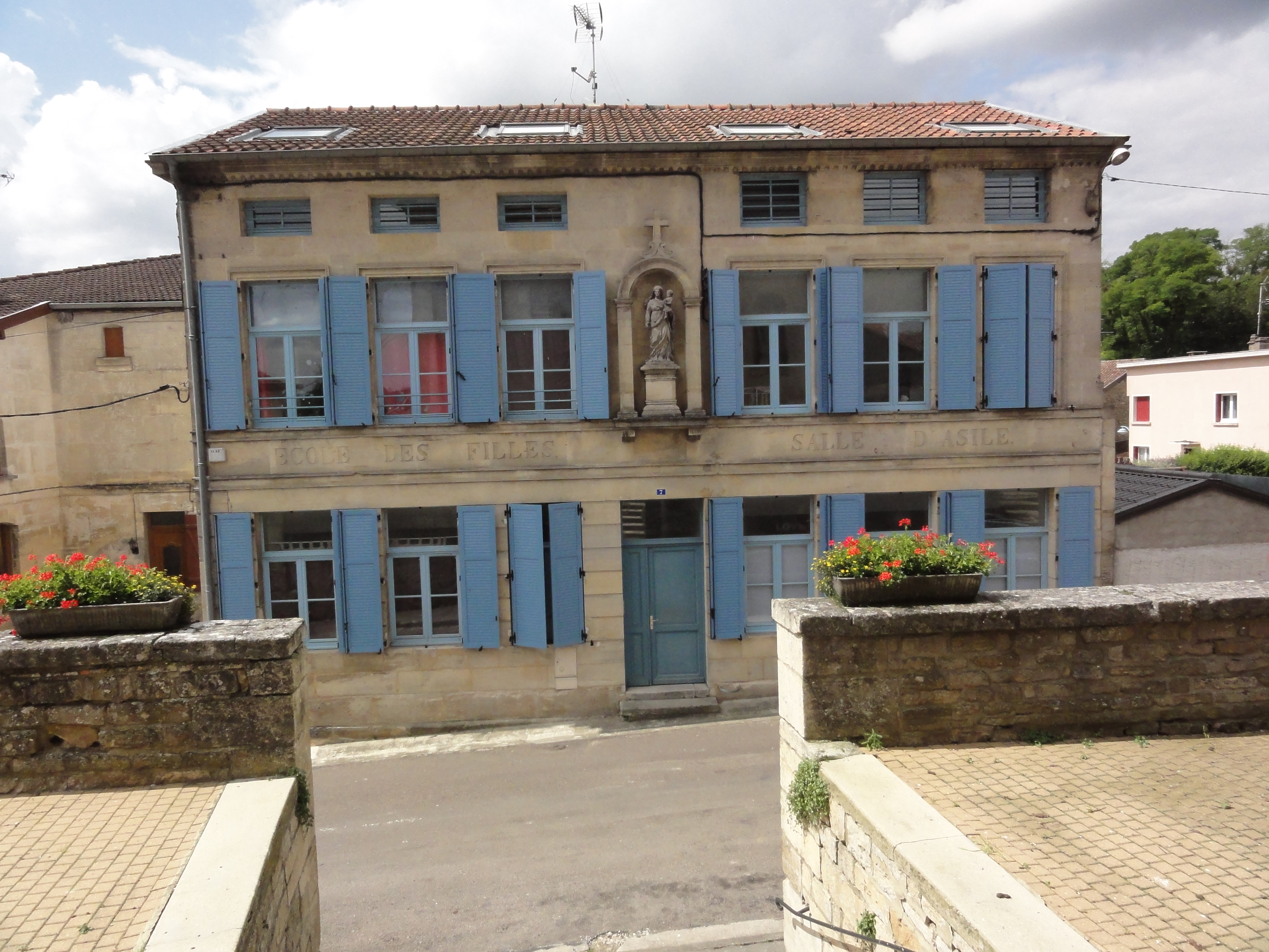 Haironville (Meuse) école des filles et salle d'asile (salle d'asile est l'ancien mot pour école maternelle)